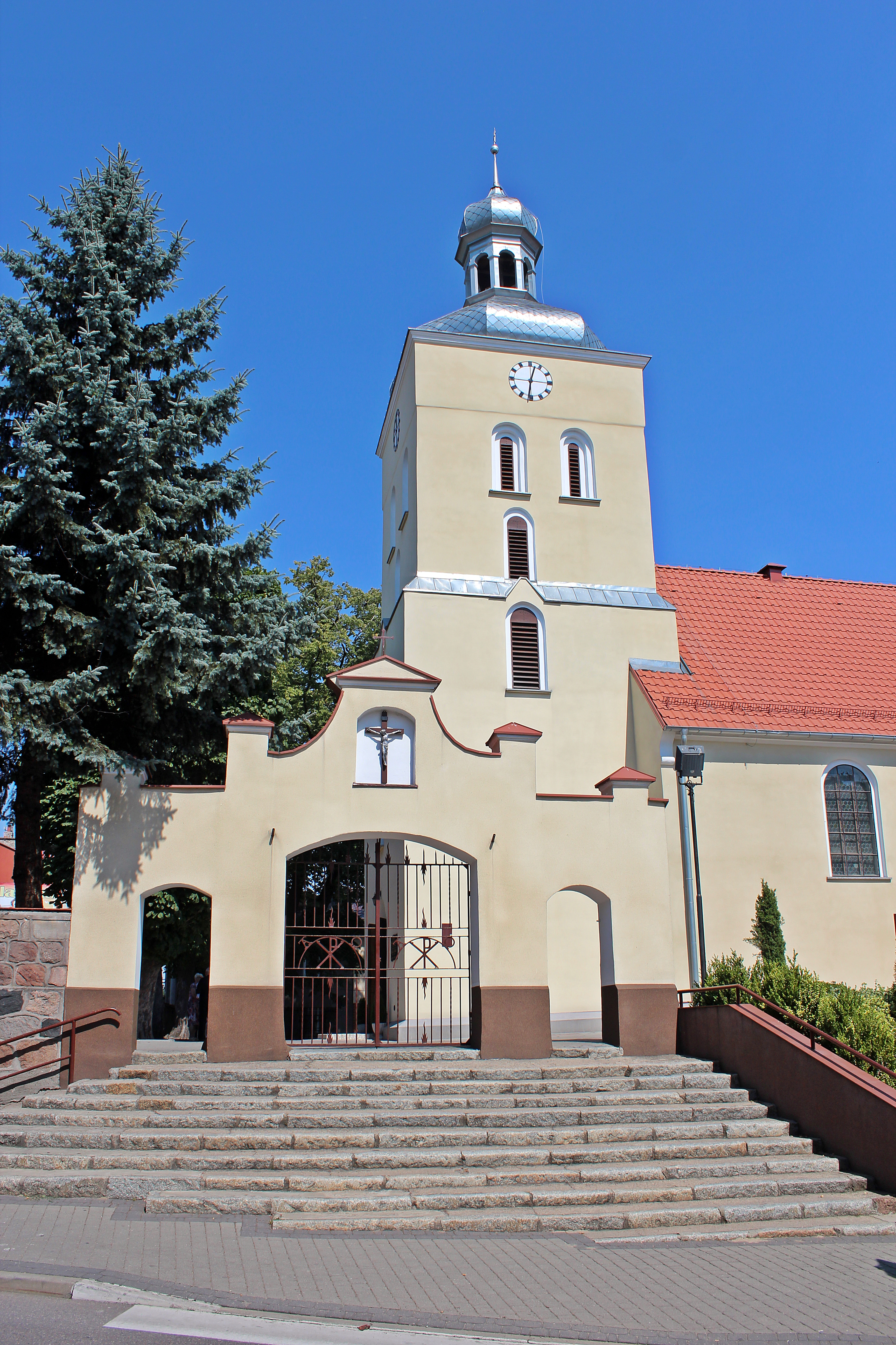 Kościół św. Wojciecha w Lidzbarku (2015)